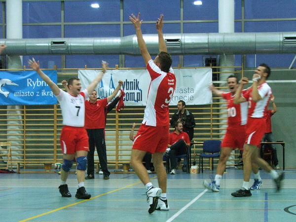 Po meczu z Politechniką Krakowską